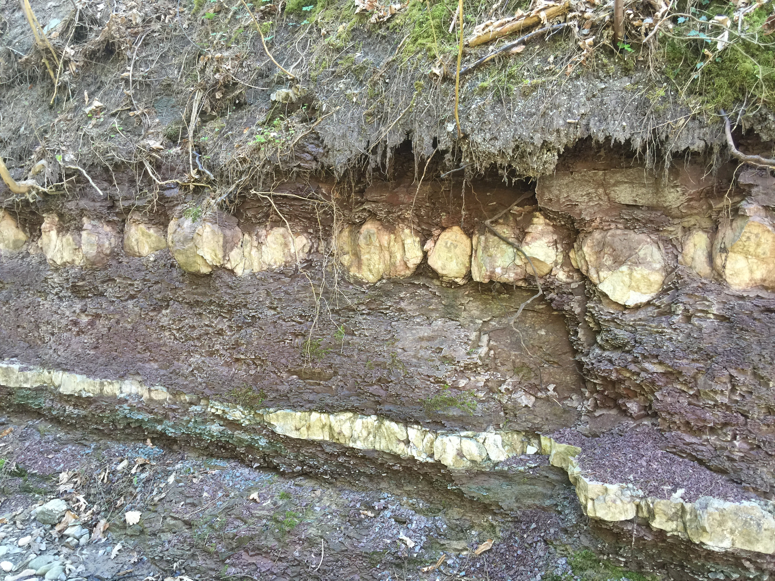 Klingenbach